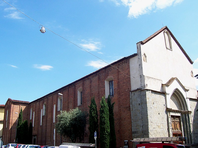 Pistoia - Chiesa di S. Domenico